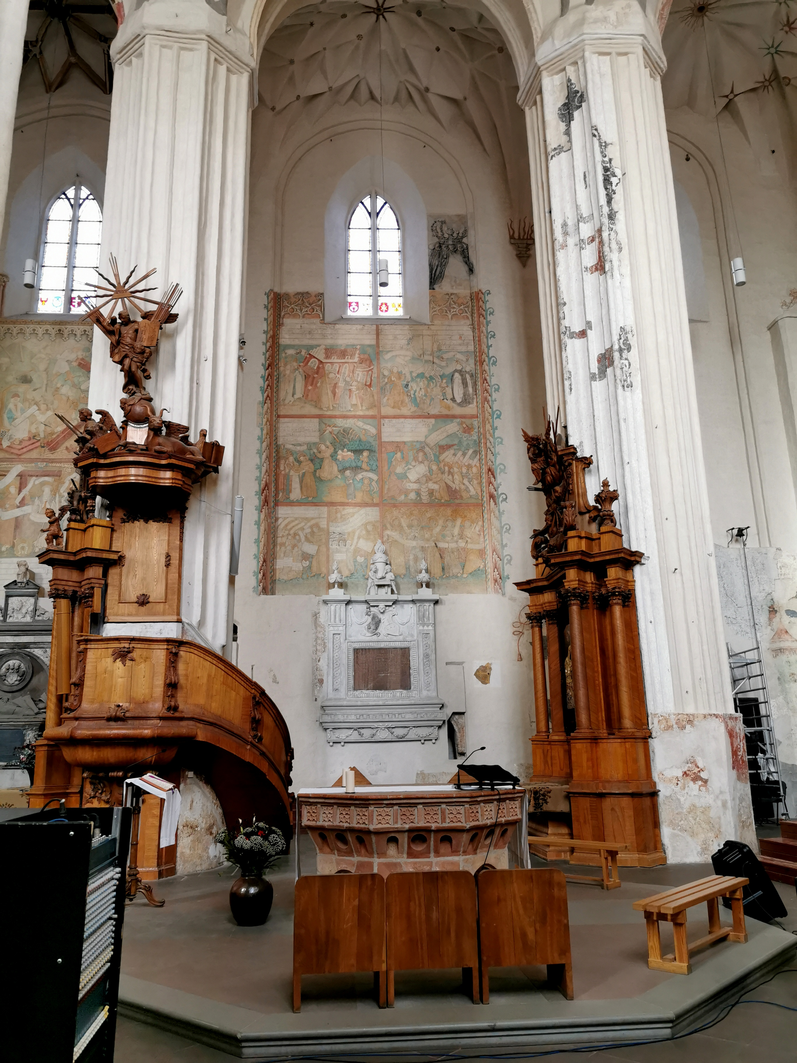 Bernardinų bažnyčios interjeras